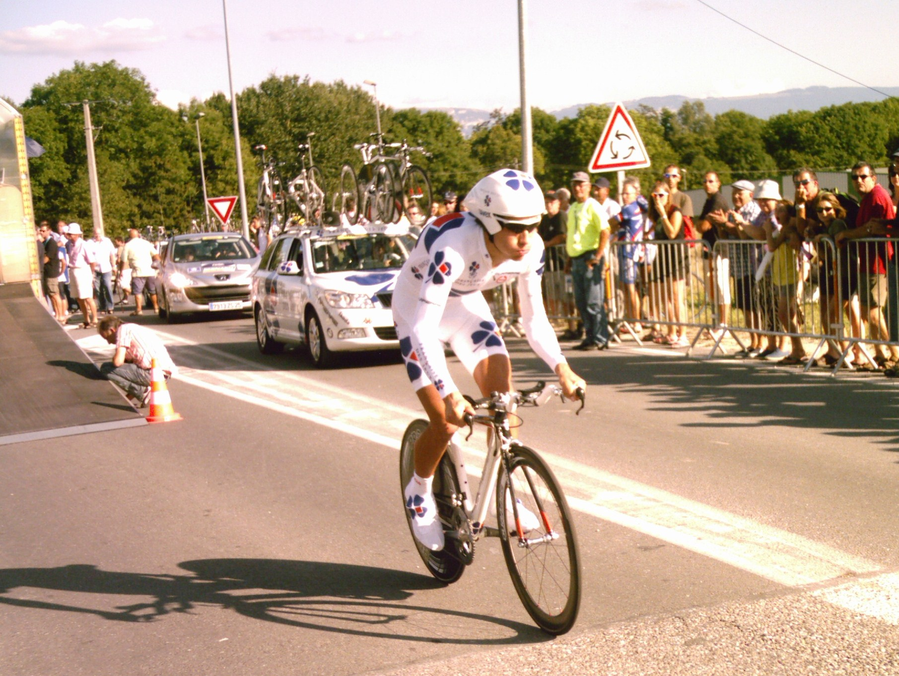 Vincent Dauga au départ du contre-la-montre de la troisième étape b du Tour de l'Ain 2009